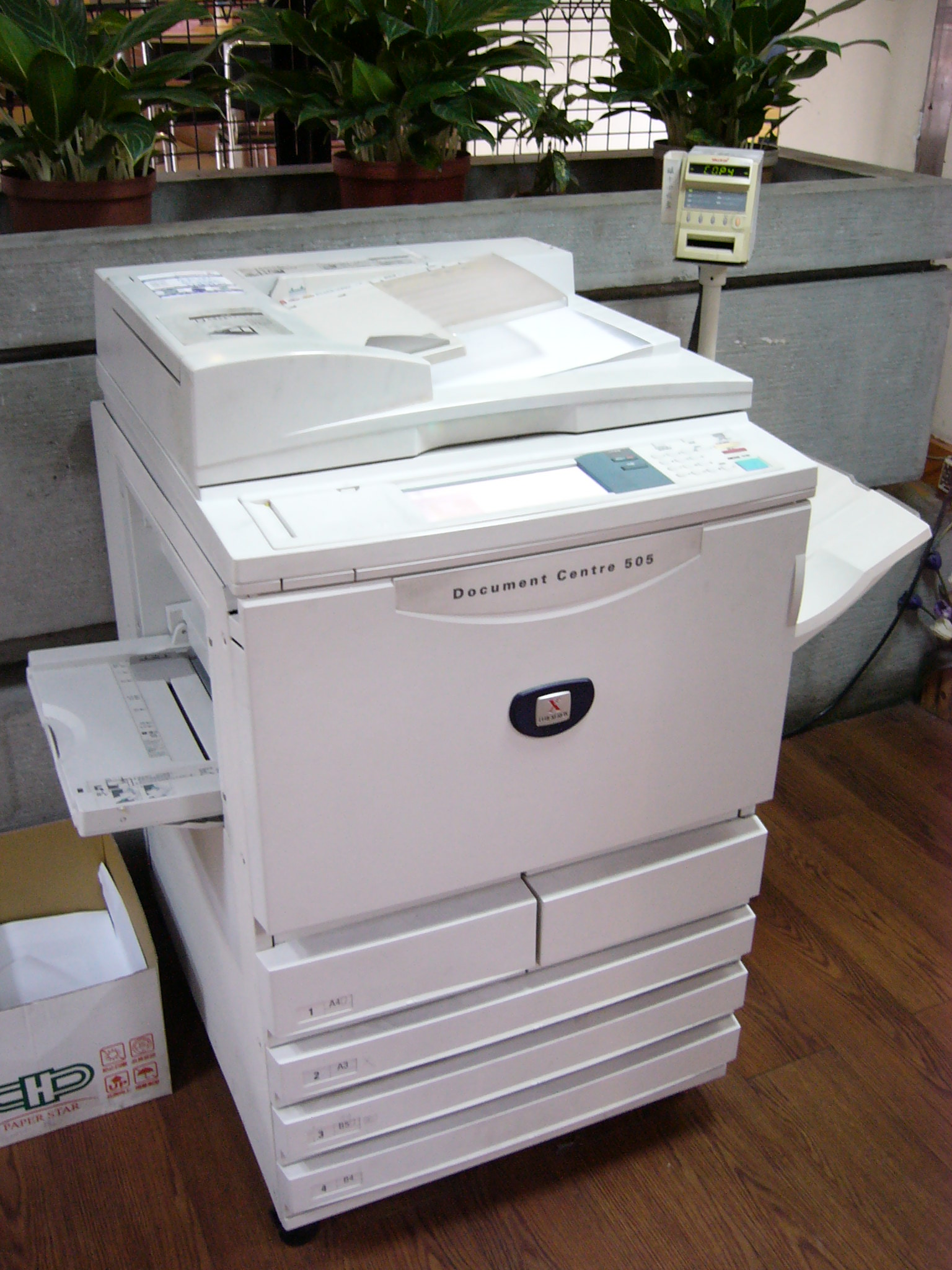 中文（台灣）: 富士全錄影印機Document Centre 505與台灣全錄磁卡讀卡機Walk-In 120D，位於中華民國國家圖書館總館1樓。